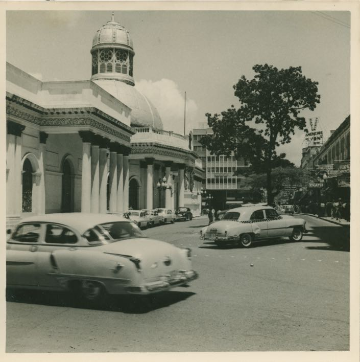 Vista del Palacio Federal Legislativo en Caracas.